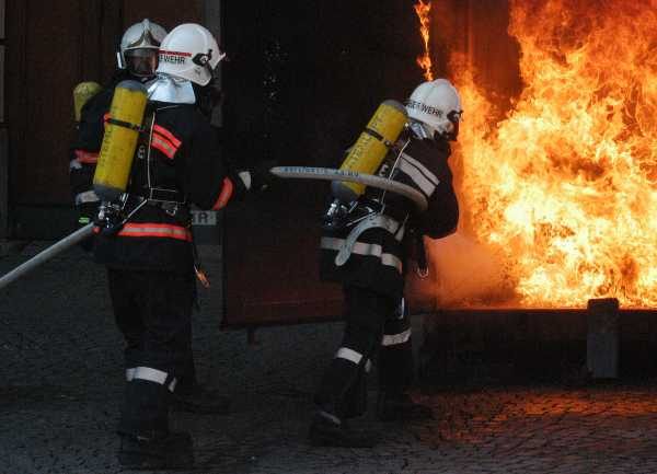 Wiener Feuerwehr bei Brandbekämpfung (gestellte Szene)